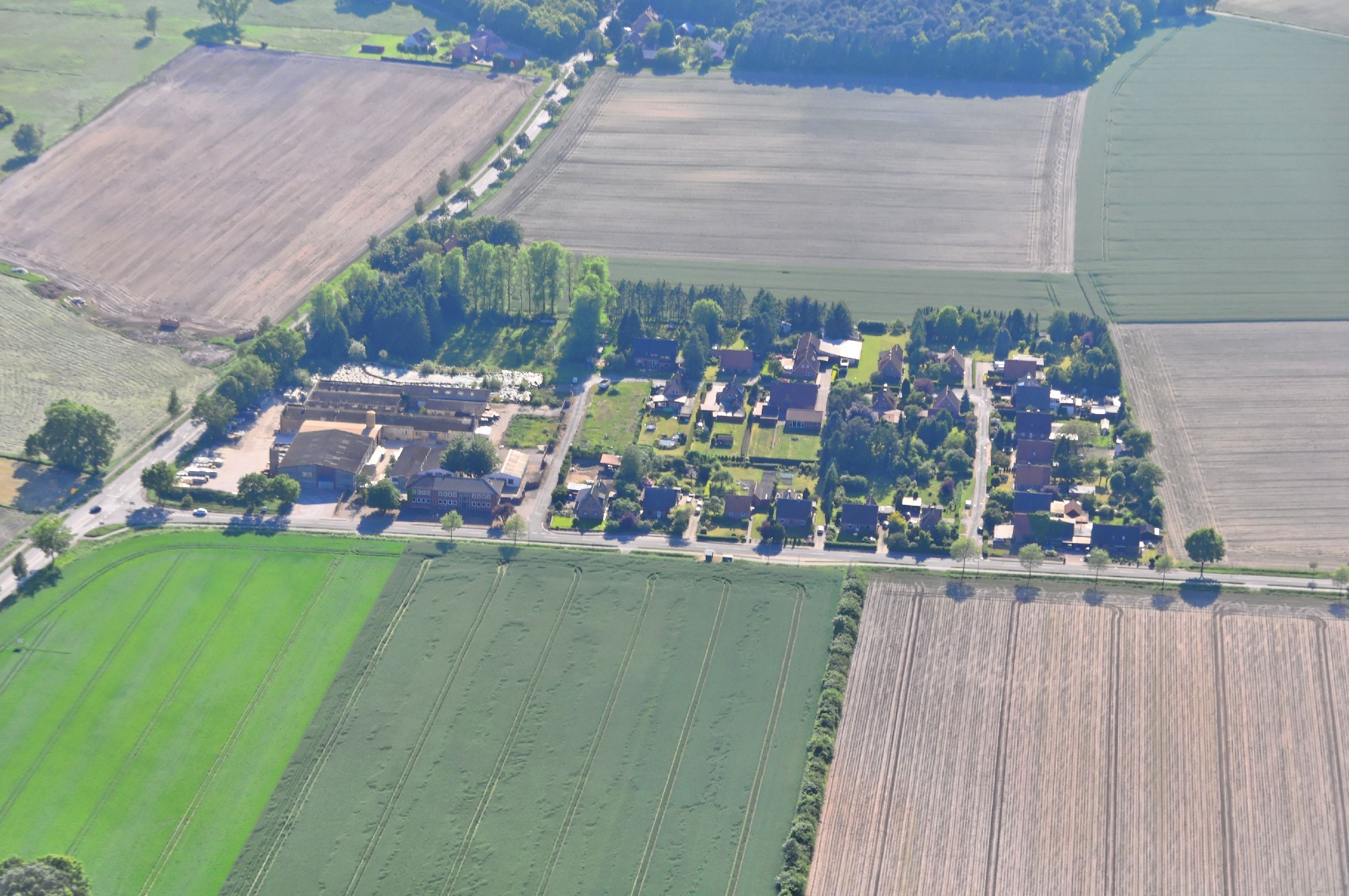 Überführungsflug vom Flugplatz Nordholz-Spieka über Lüneburg, Potsdam zum Flugplatz Schwarzheide-Schipkau